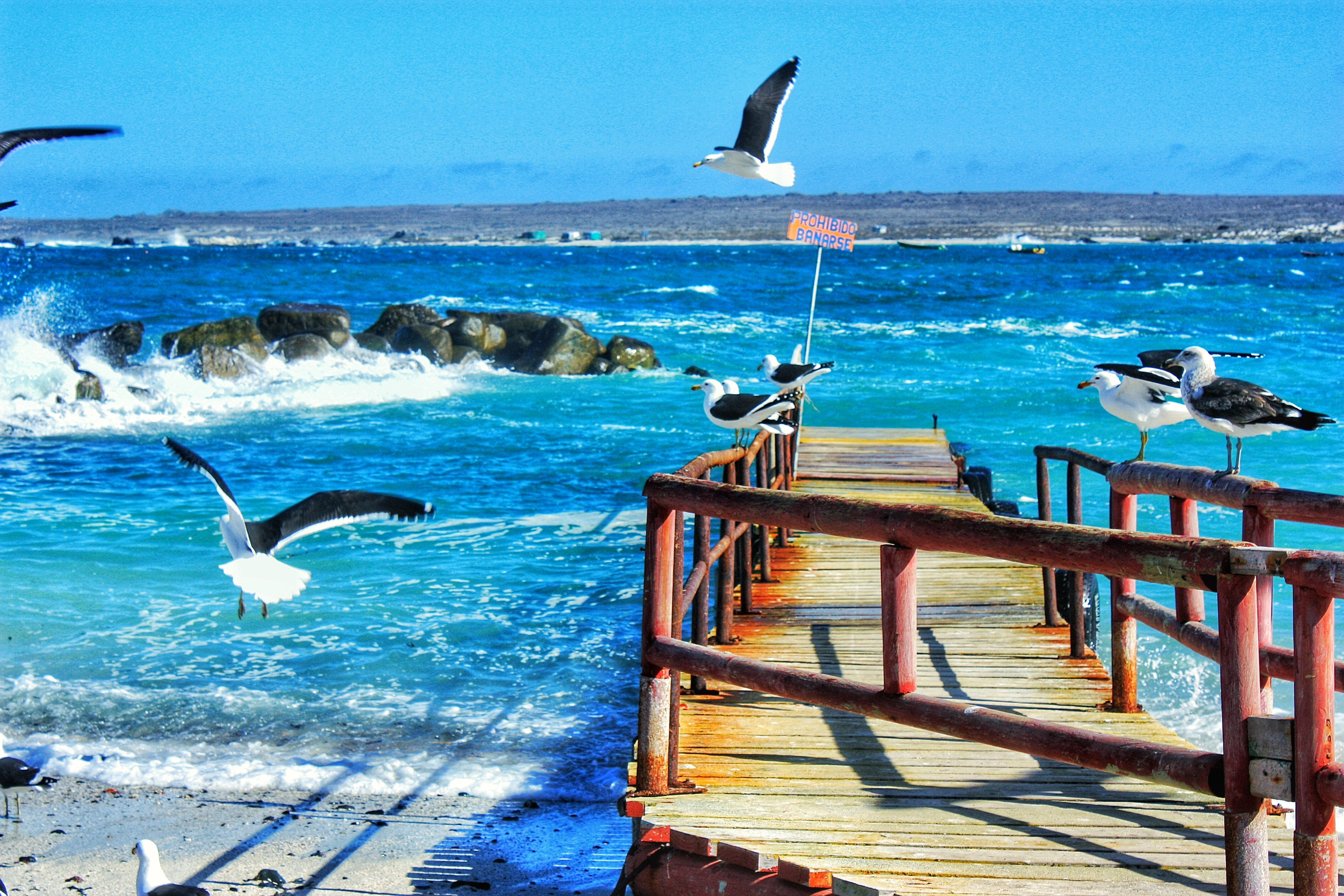 Caleta de Punta de Choros, Coquimbo. Chile